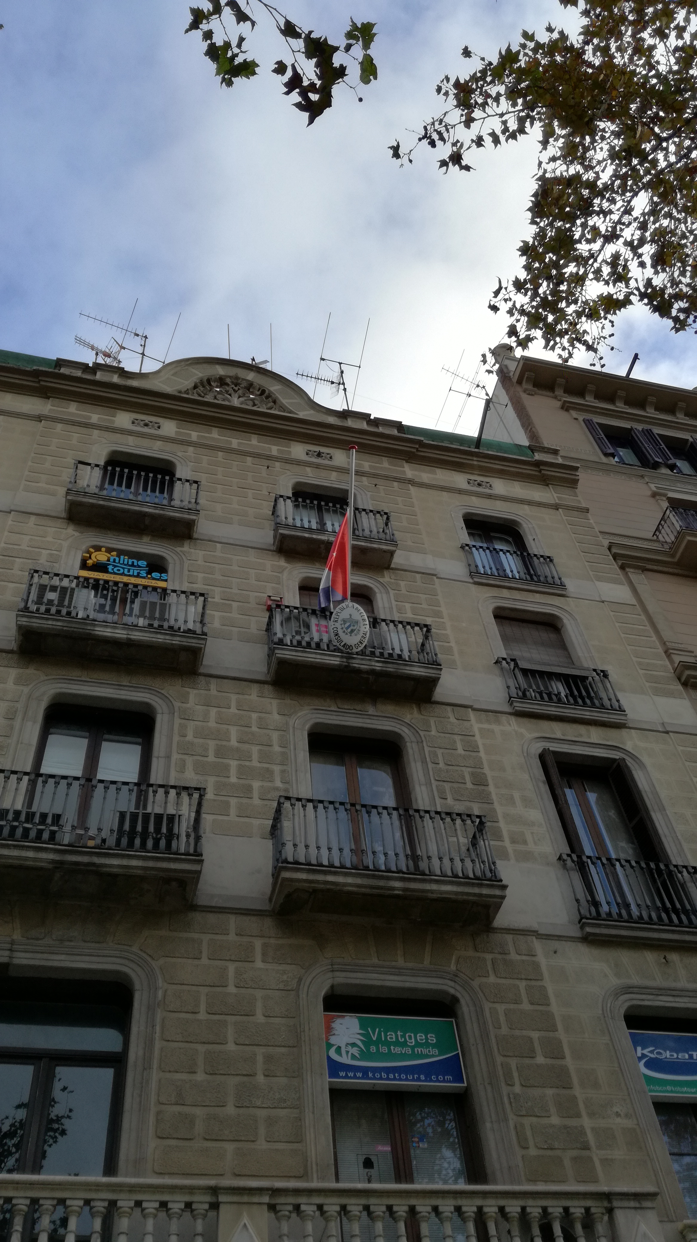 Fachada del edifico donde está el Consulado de Cuba en Barcelona en.